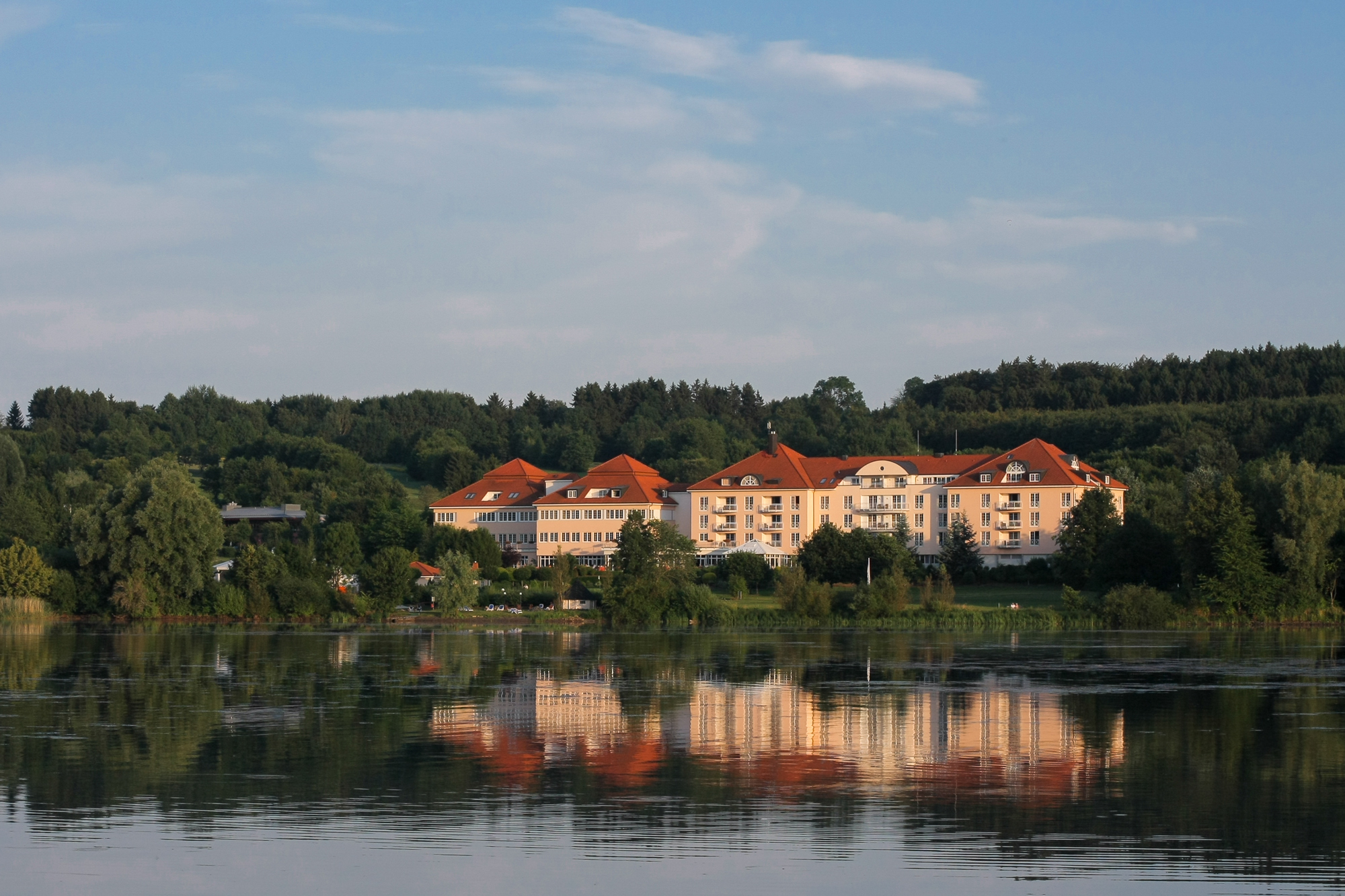 Lindner Hotel & Sporting Club am Wiesensee im Westerwald